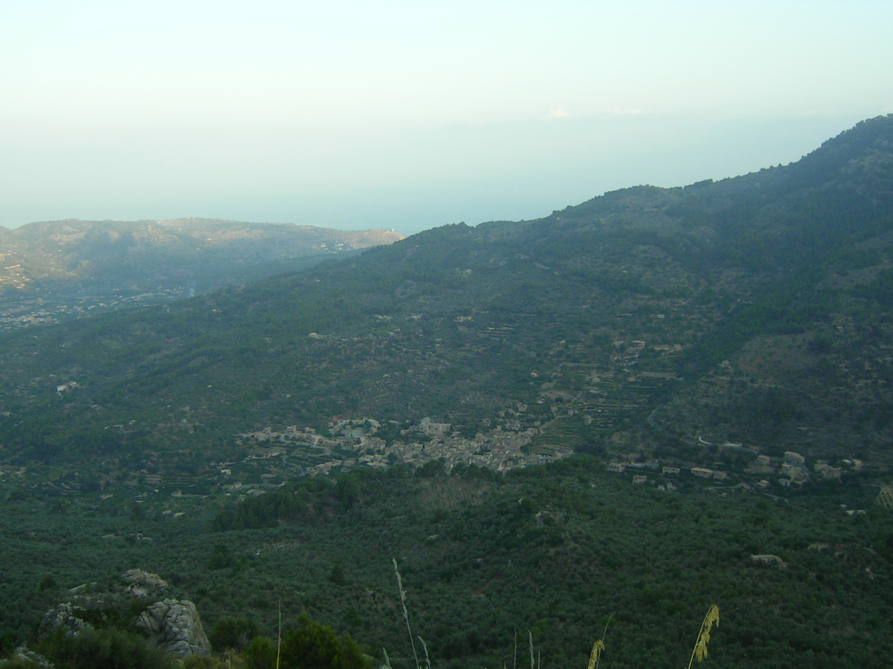 Fornalutx, Mallorca. Foto feta pujant al Portell de la Costa.